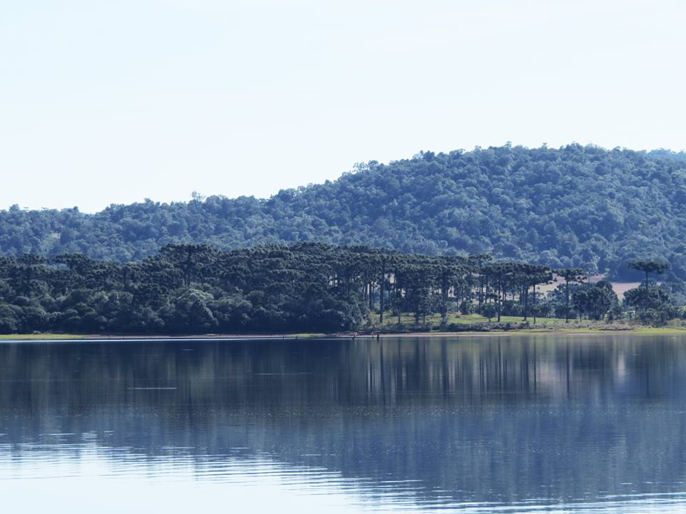 Fotos retiradas no PARNA